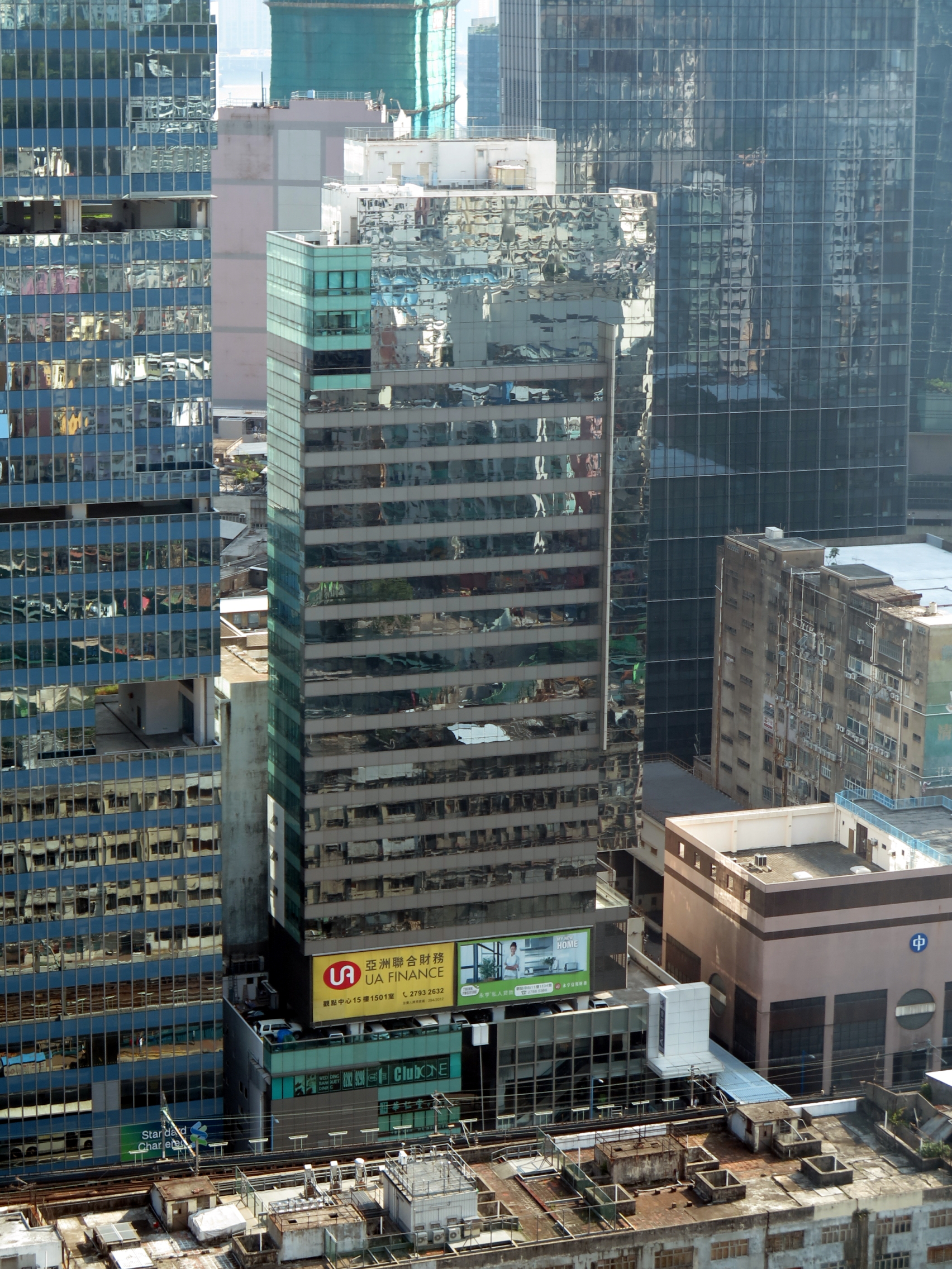 Kwun Tong View Building